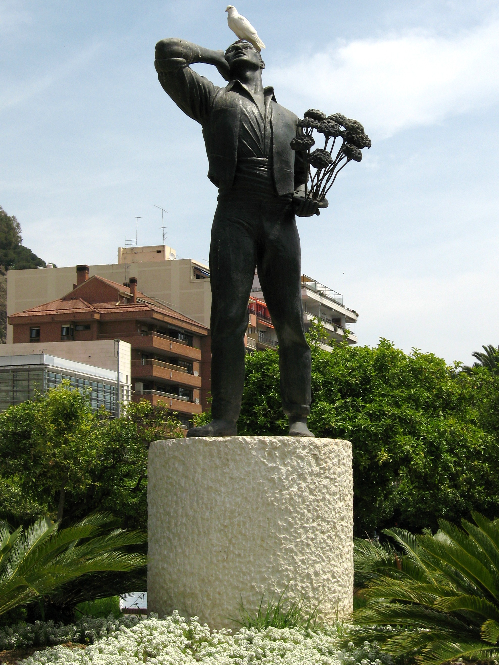 Statue „El Biznaguero“ (von Jaime Fernández Pimentel, 1963) in den Pedro-Luis-Alonso-Gärten (Jardines de Pedro Luis Alonso) am Rathaus von Málaga, Andalusien, Spanien